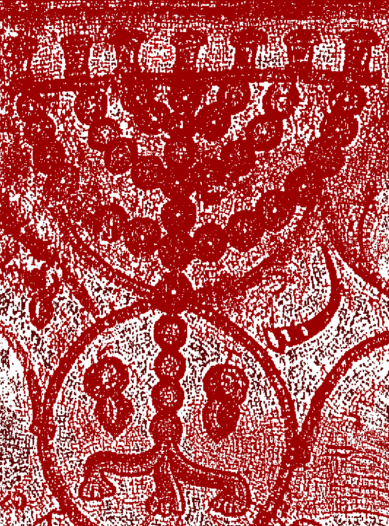 Etrog (ritual)#Shape